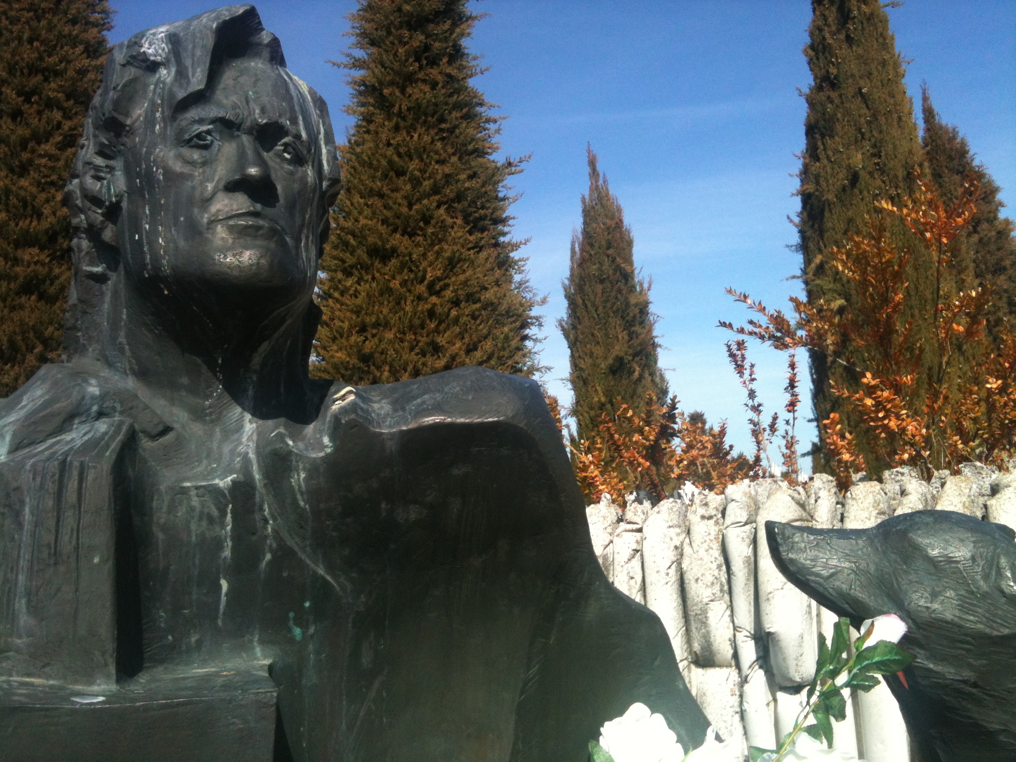 Monumento fúnebre en la tumba de Félix Rodríguez de la Fuente, en el cementerio de San José (Burgos, España). Escultura de Pablo Serrano.